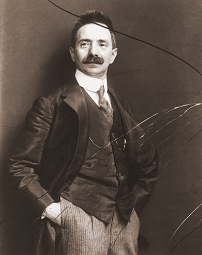 Self-portrait